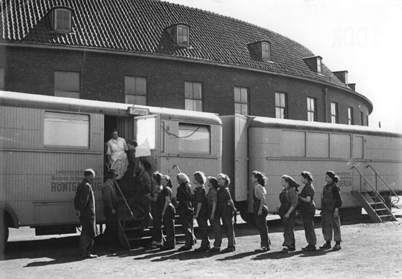 Stahl- und Walzwerk Brandenburg, Röntgenzug Zentralbild Klein 29.5.1952 Maßnahmen zum Schutze der Gesundheit. Die Regierung des Landes Brandenburg stellte den großen Betrieben einen Röntgenzug zur Verfügung, in dem von allen Kollegen und Kolleginnen Schirmbildaufnahmen gemacht werden, um Tuberkulose sofort erkennen und Maßnahmen zu ihrer Bekämpfung treffen zu können- UBz: Der Röntgenzug im Stahl- und Walzwerk Brandenburg.